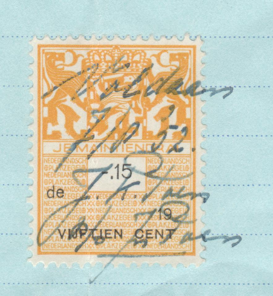 Uitvergroting kwitantiezegel.